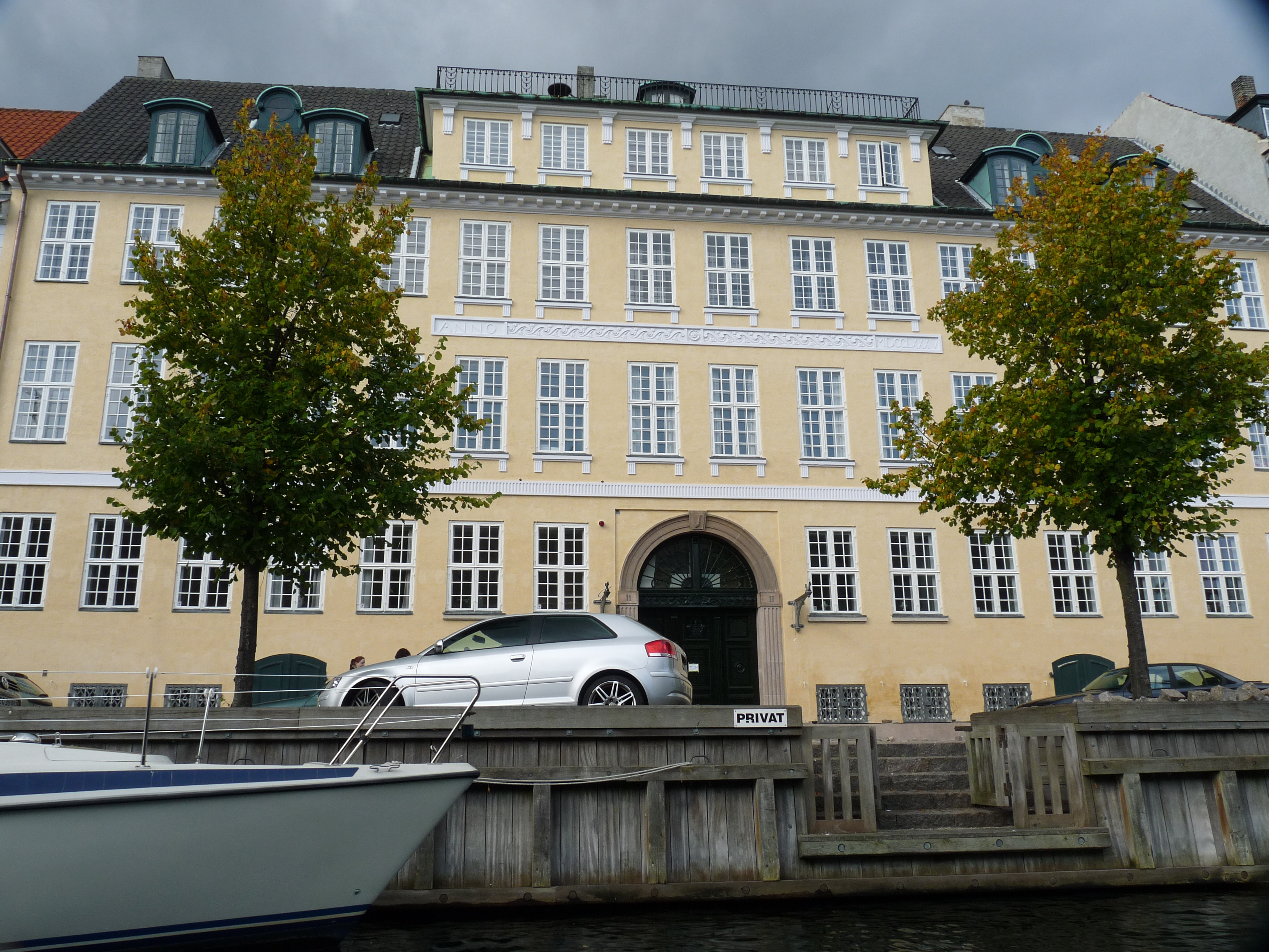 Heerings Gård, a house at 11 Overgaden neden Vandet in the Christianshavn neighbourhood of Copenhagen, Denmark